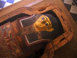 mummy in Jerusalem המומיה במכון האפיפיורי למקרא